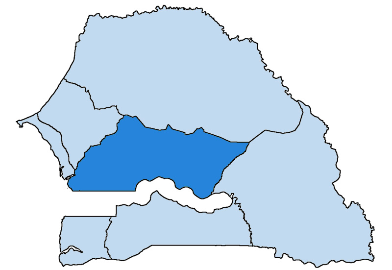 Mappa della diocesi cattolica di Kaolack, in Senegal. Anno 2009.